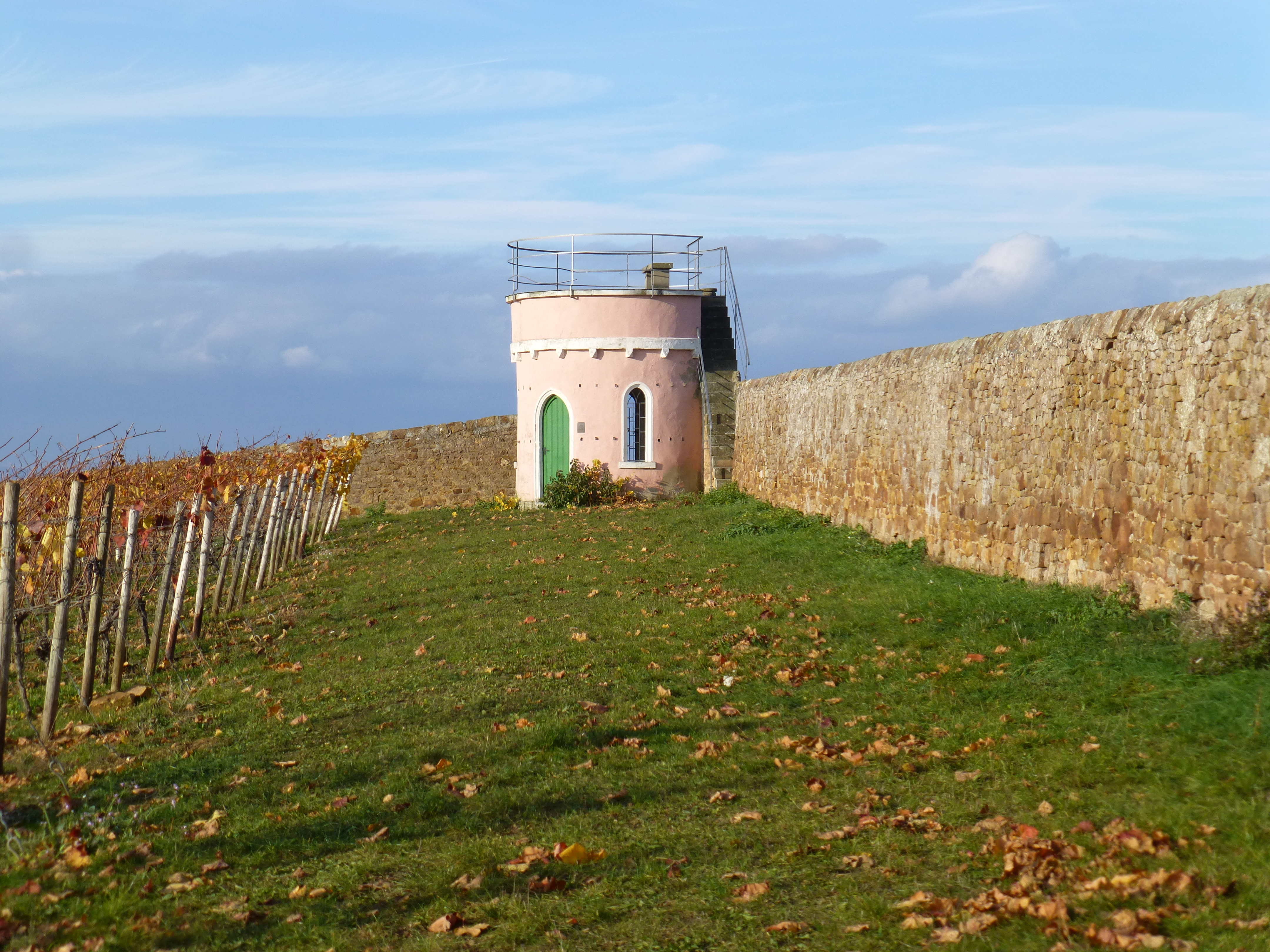 2001 prämiertes Weinbergshäuschen in Wendelsheim